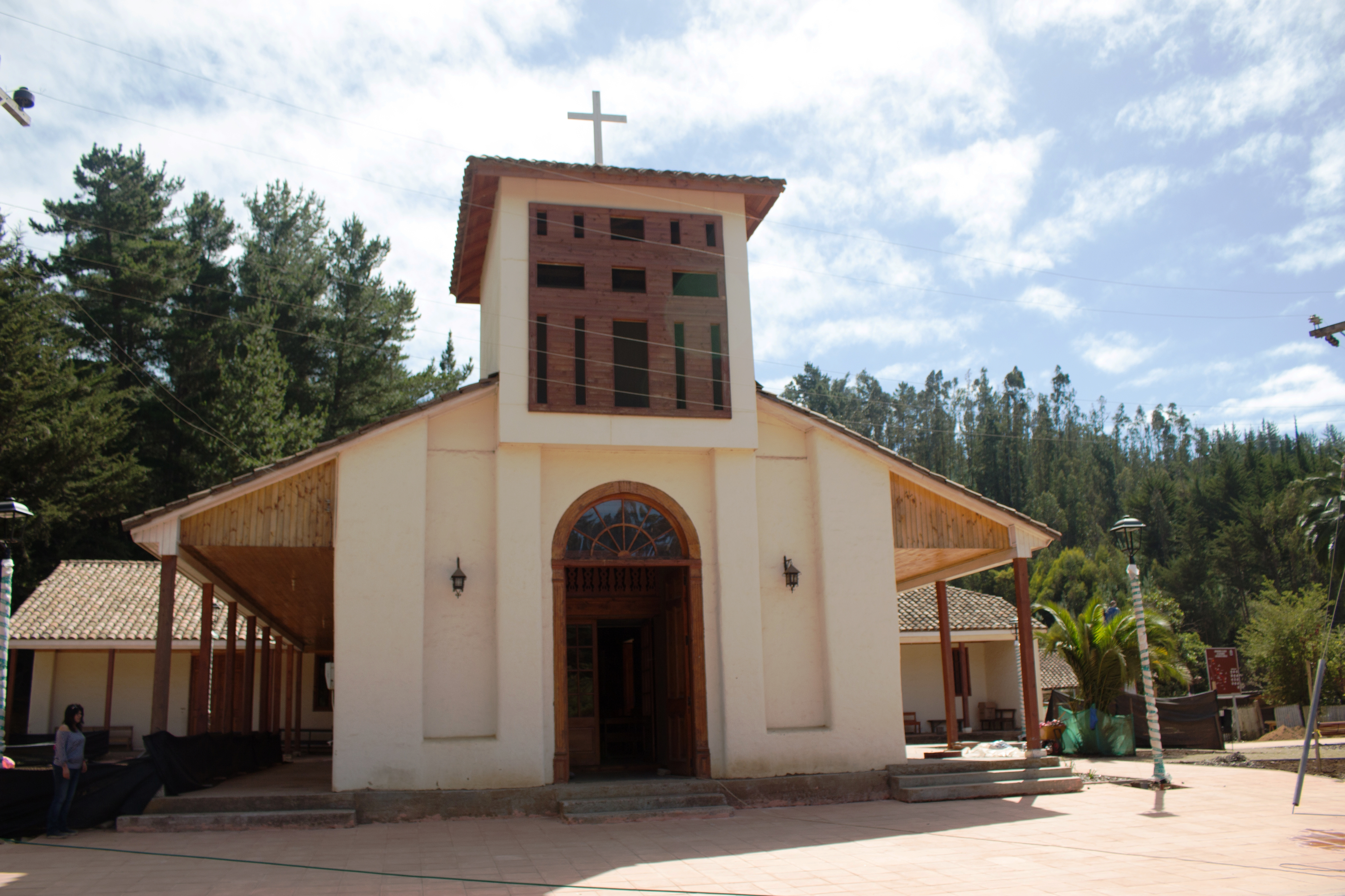 Iglesia San Andrés en Ciruelos, comuna de Pichilemu, Chile